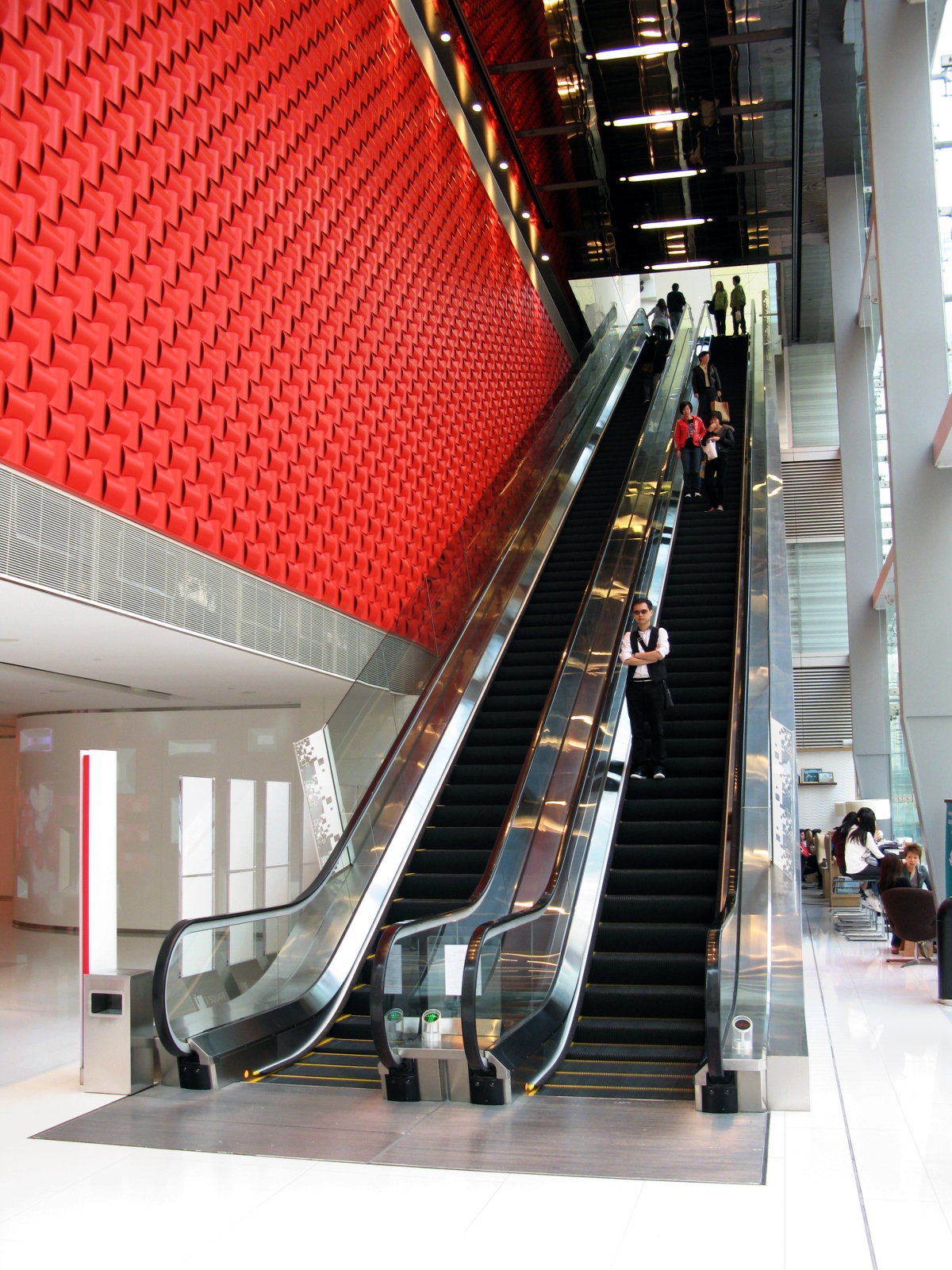 iSQUARE Escalator